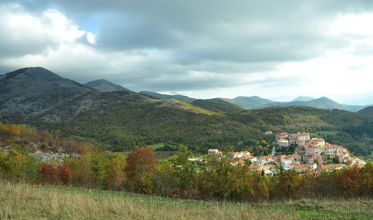 il borgo di Acquafondata circondato dalle cime dei monti della Meta; in lontananza la catena dei monti del Matese.